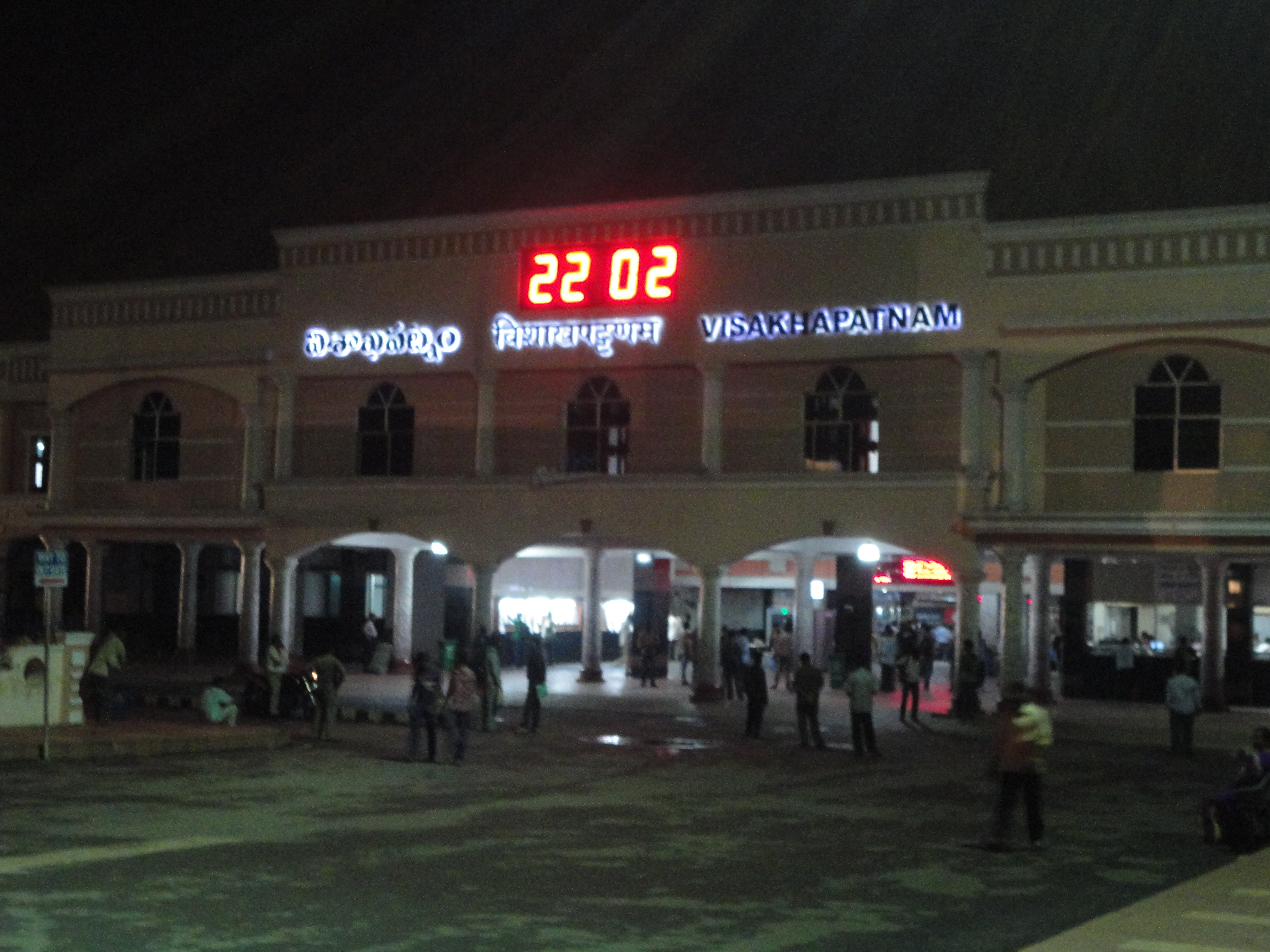 విశాఖపట్నం జంక్షన్